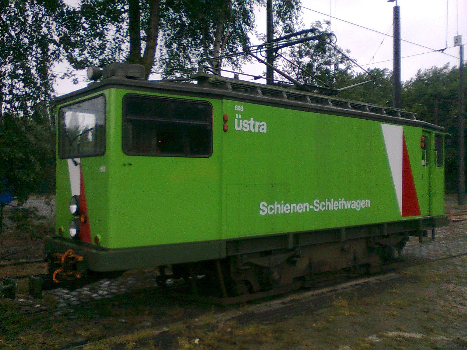 Historischer Atw 808 Schienenschleifwagen Tag der offenen Tür Btf Glocksee